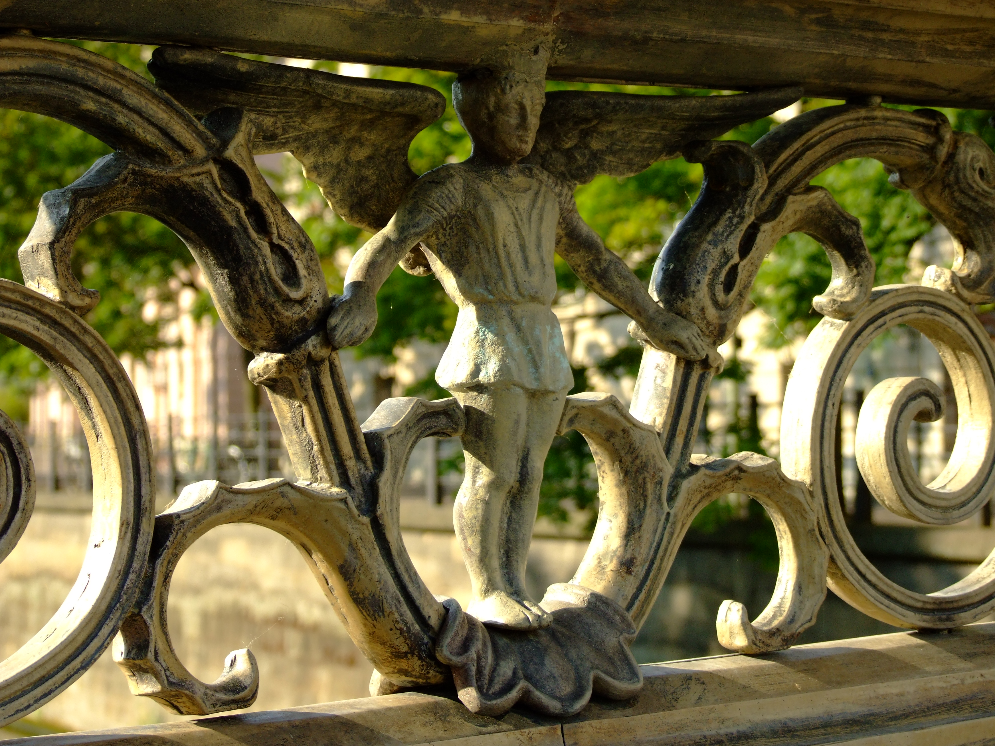 Detail des Geländers an der Eisernen Brücke in Berlin. Die Brücke überspannt den Kupfergraben und verbindet die Straßen Hinter dem Gießhaus mit der Bodestaße.